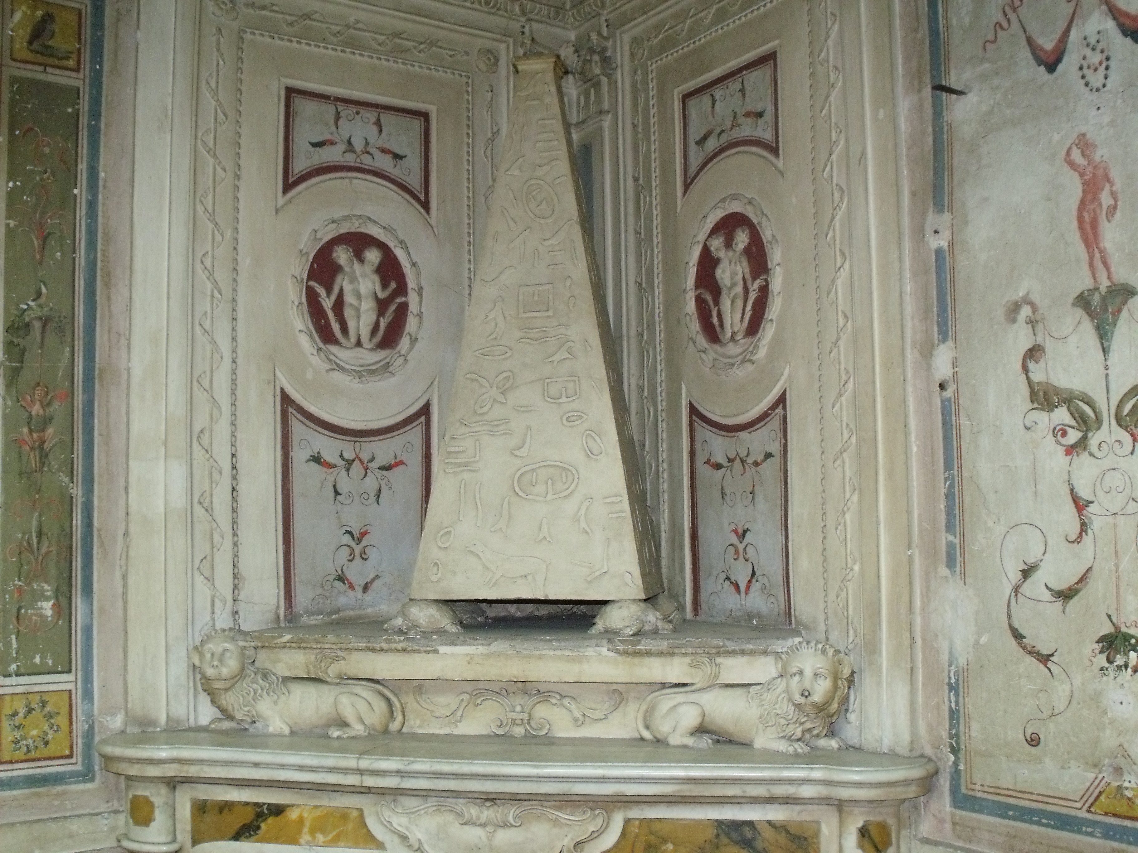 Una delle caratteristiche piramidi che sormontano i camini della Biblioteca Comunale di Anghiari - si notino le figure leonine alla base del gruppo scultoreo.